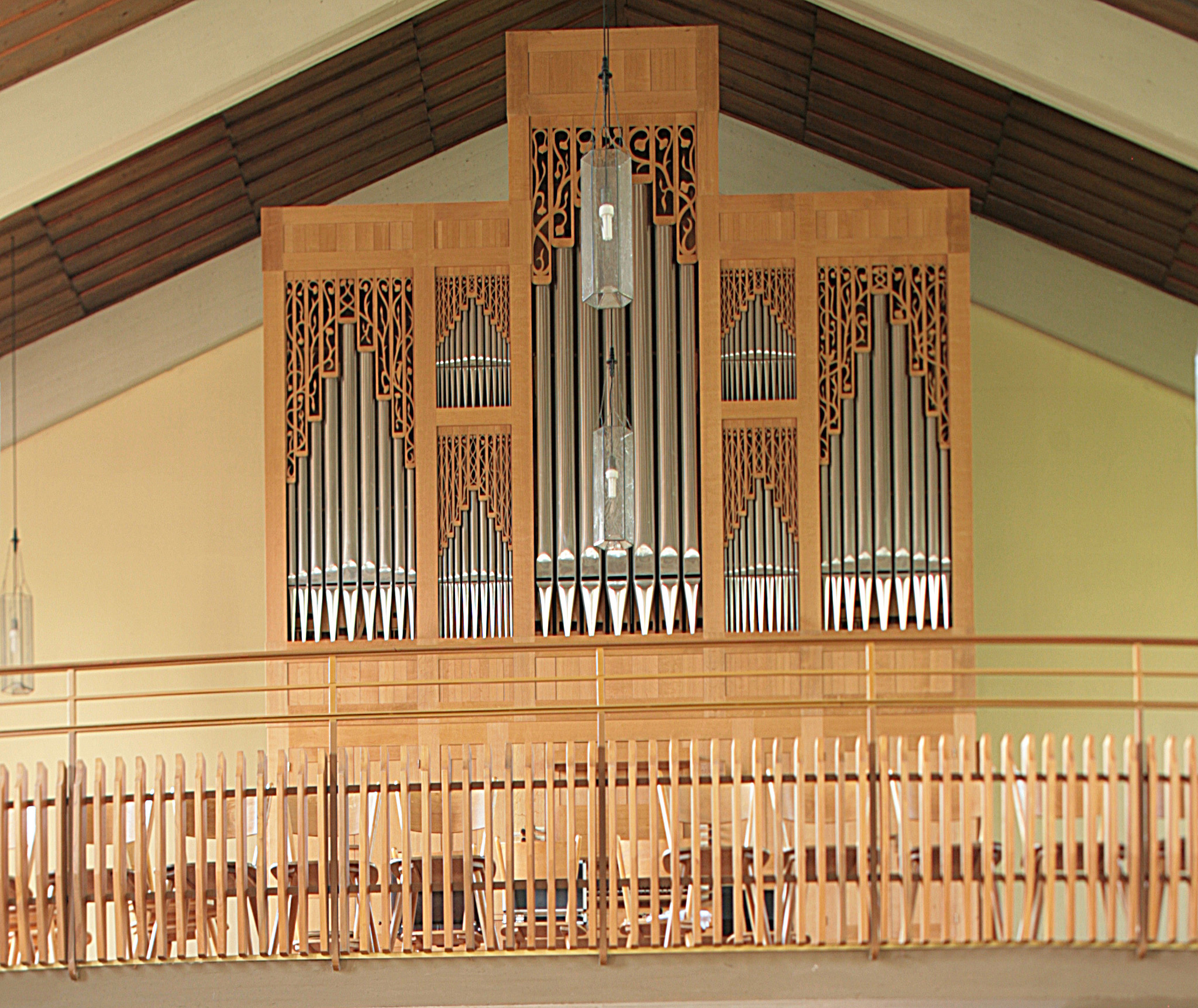 Orgel der Christuskirche Lörrach, Baden-Württemberg, Deutschland